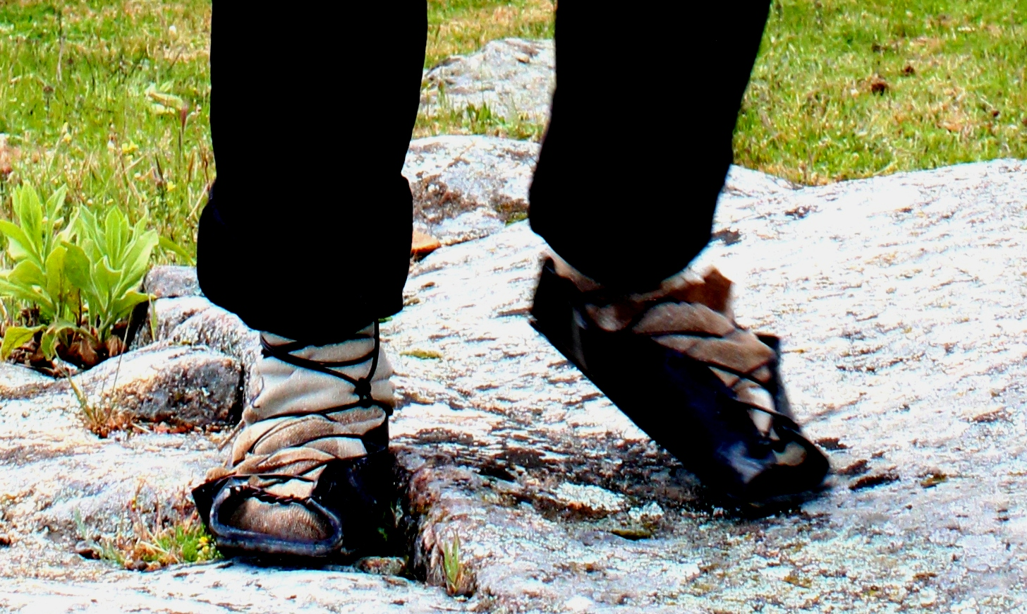 Calzado típico de los serranos abulenses, confeccionado con cuero de vaca sobre peales de paño enrollados en el pie.